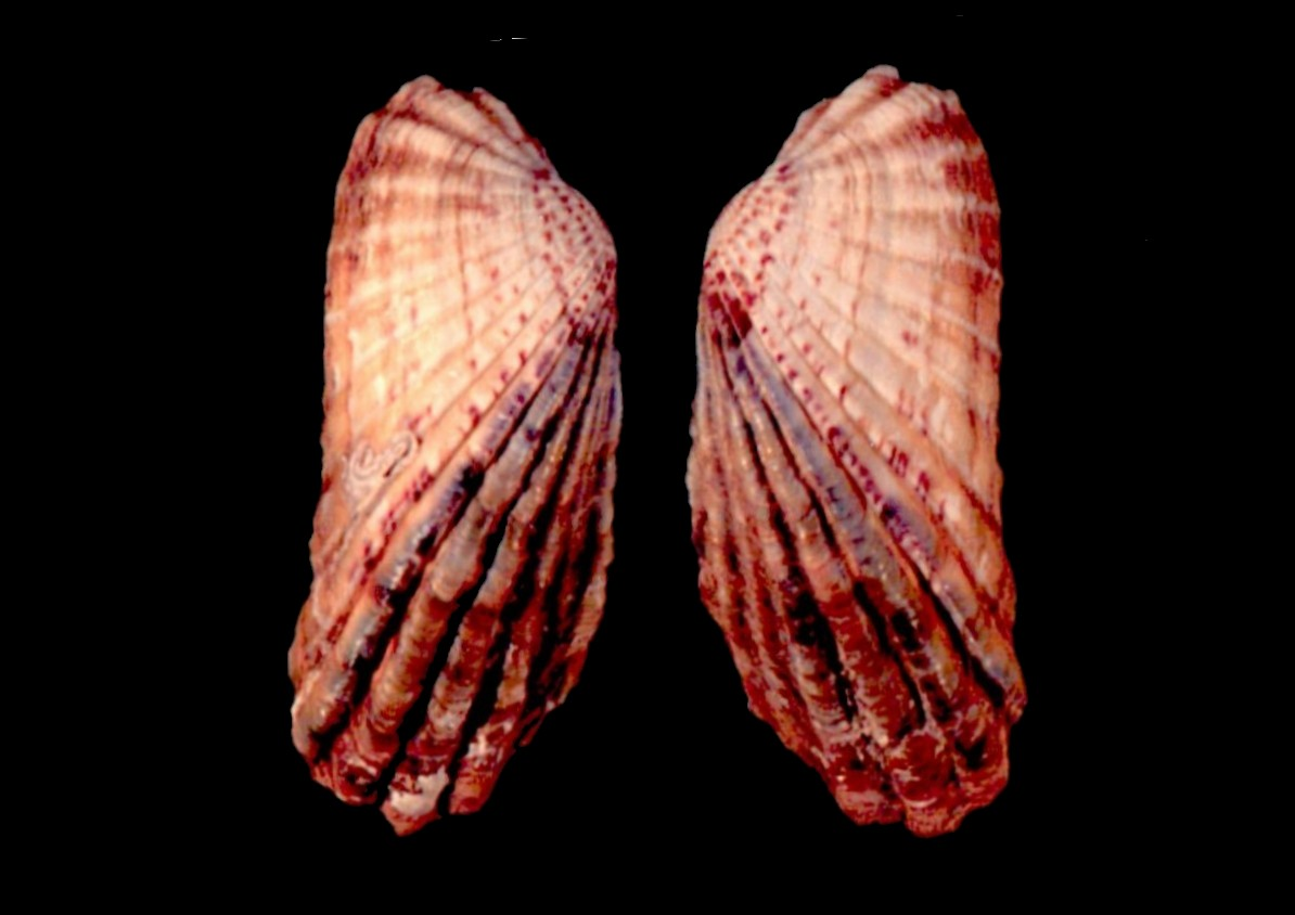 Carditamera gracilis (Shuttleworth, 1856) colectado 1994 en Chacopata, estado Sucre Venezuela